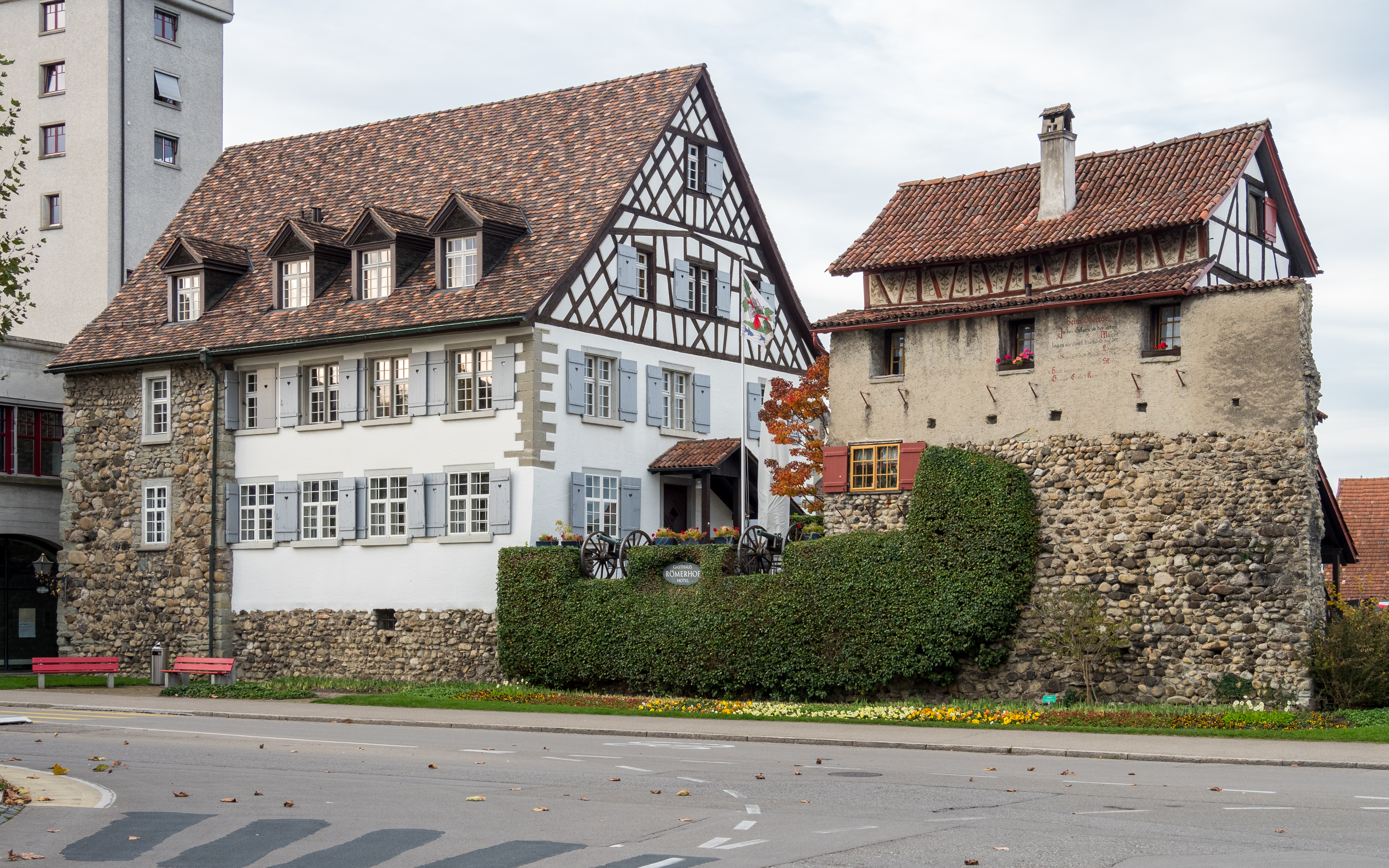 Gasthaus Zur Freiheit / Römerhof mit Resten der Stadtmauer